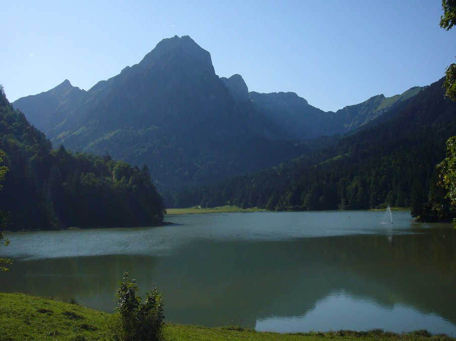 Brünnelistock von Osten über dem Obersee